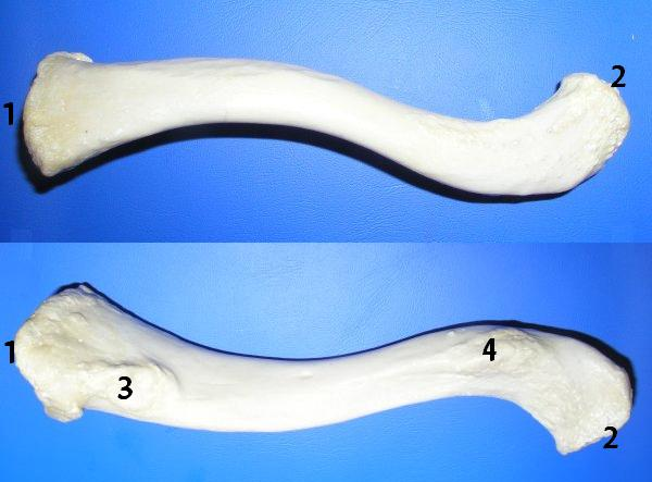 המקורות: מתוך ויקישיתוף, נערכו על ידי והועלו מחדש.